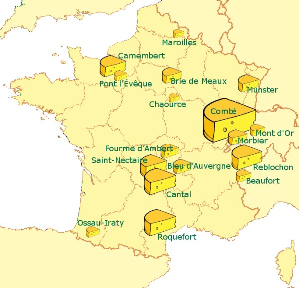 Carte des principales AOC de fromage en France, basée sur les chiffres 2005 de l'Association fromages de terroir, pour les fromages dont la production dépasse 2000 tonnes en 2005, production de Comté = 51249 tonnes